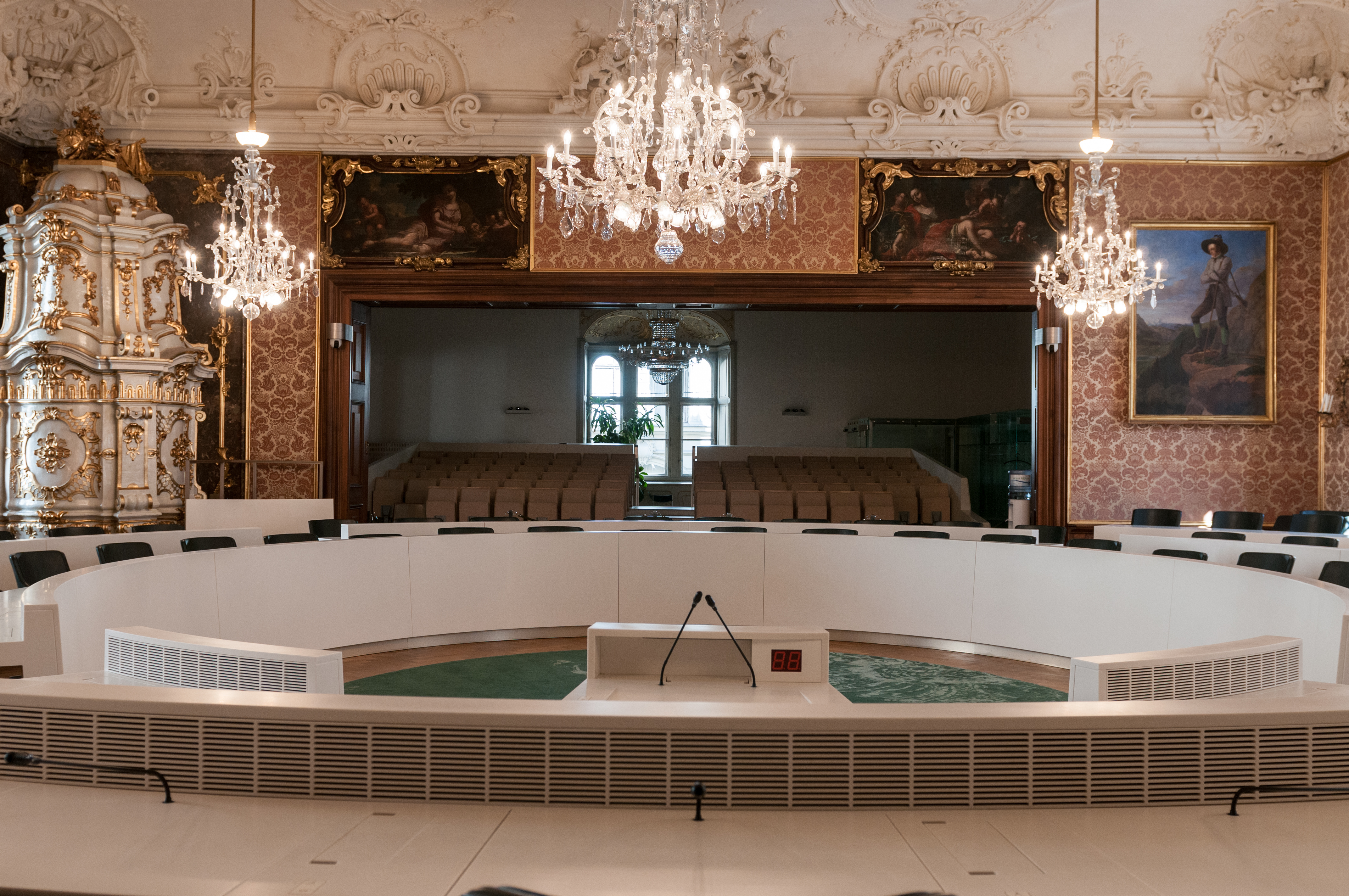 Landtagsprojekt Graz